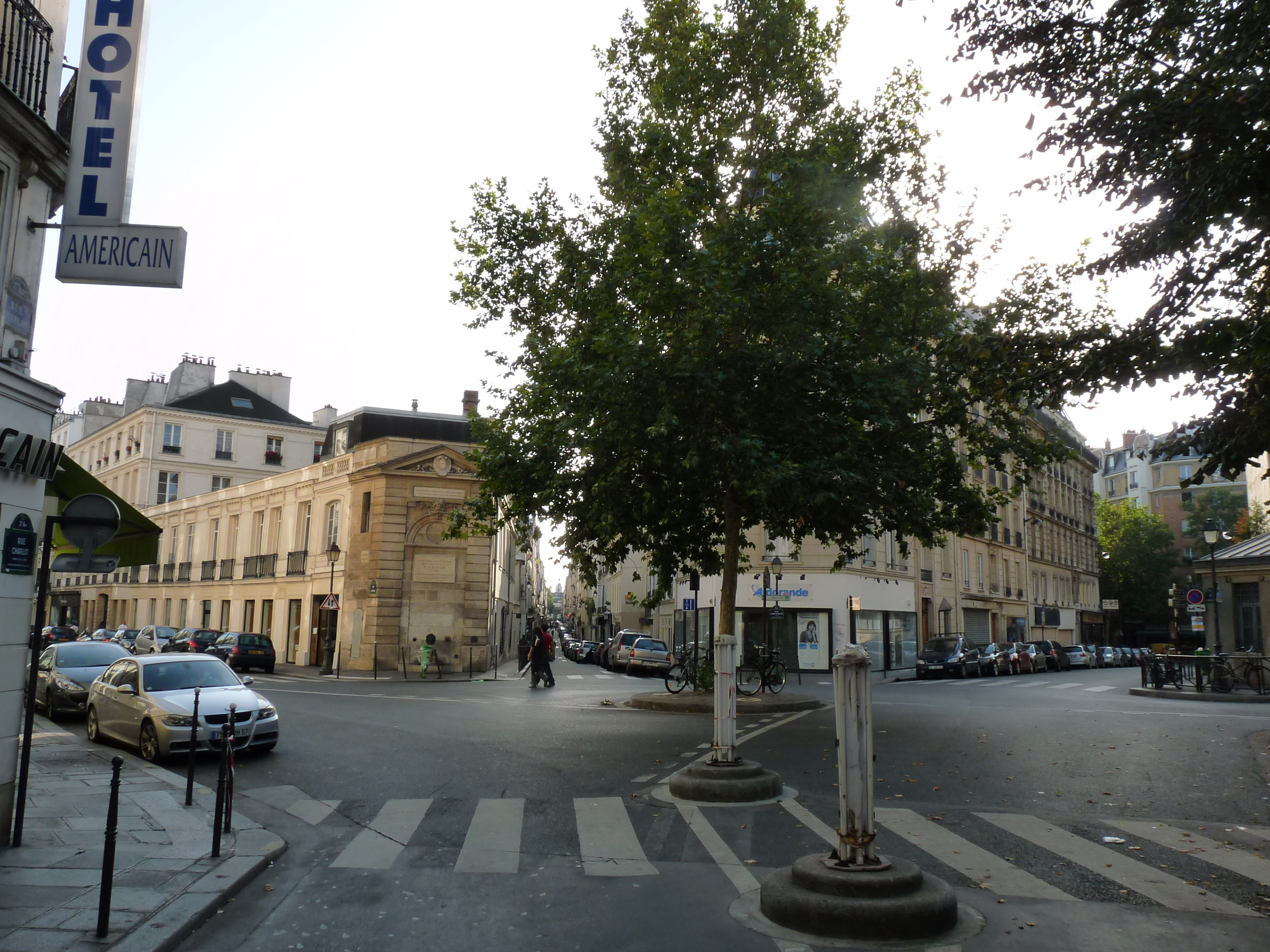 La place Olympe de Gouges à Paris, vue depuis la partie nord de la rue Charlot. On voit, de gauche à droite: rue de Turenne, rue Charlot, rue de Franche-Comté, et rue Béranger.